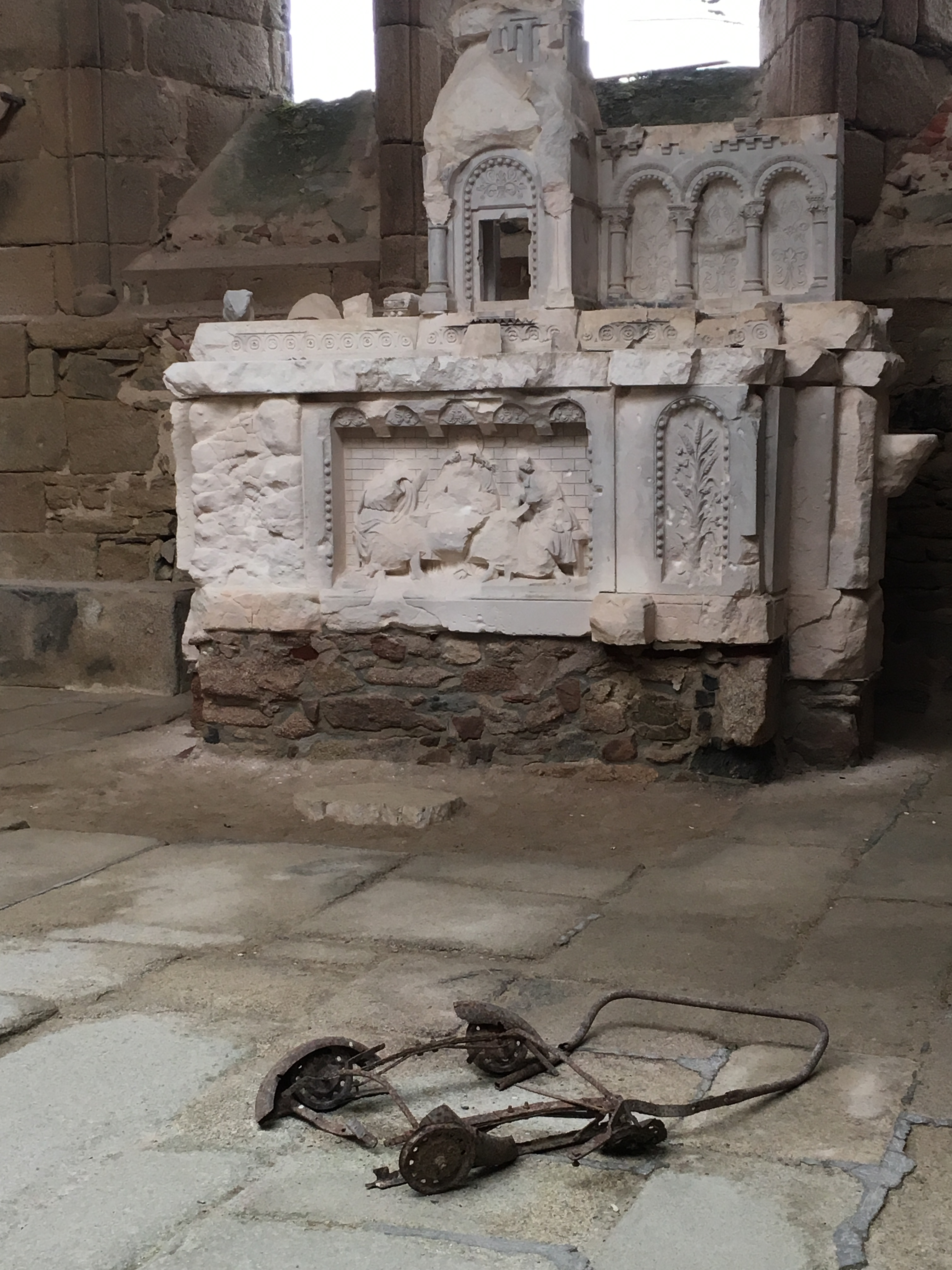 Oradour-sur-Glane est le nom d’une petite ville du Limousin, à 22 kilomètres au nord-ouest de Limoges, où une unité de Waffen SS massacra, le 10 juin 1944, 642 hommes, femmes et enfants. .